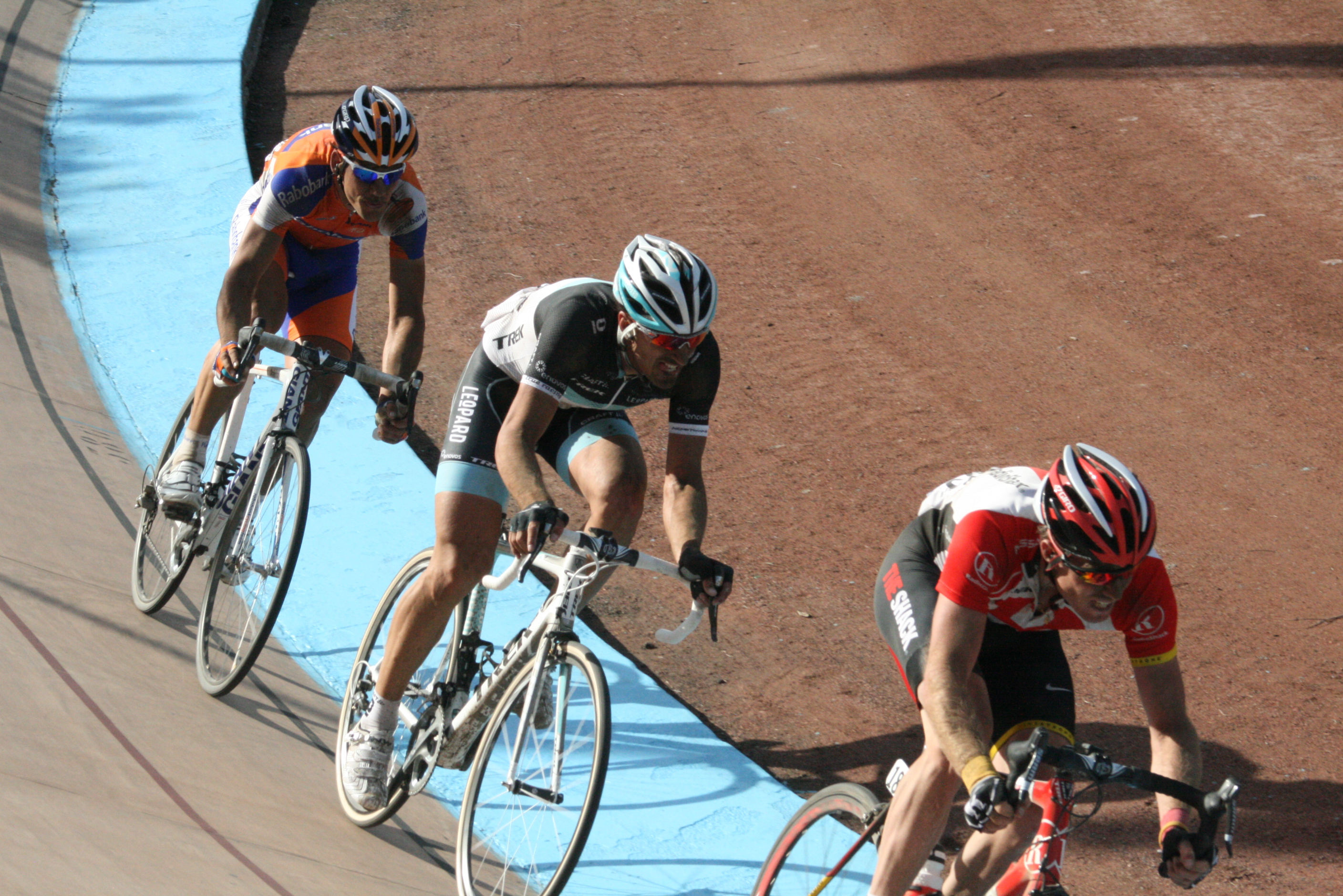 Arrivée de Paris-Roubaix 2011 au vélodrome de Roubaix Maarten Tjallingii, Fabian Cancellara, Grégory Rast